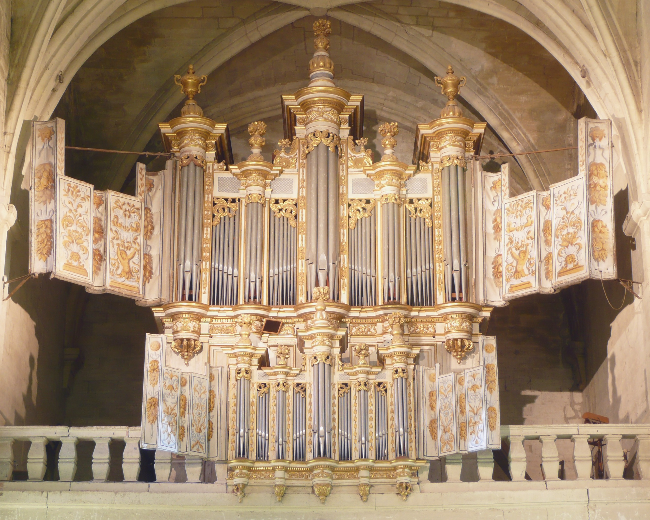 Uzès (Gard, France), ancienne cathédrale Saint Théodorit, intérieur, buffet de 1678 par Pierre Biscarat, maître sculpteur et menuisier à Pont-Saint-Esprit (30), pour un orgue du Révérent-Père François Castie, peint et doré par le montpelliérain Jean Rouveyre en 1685.